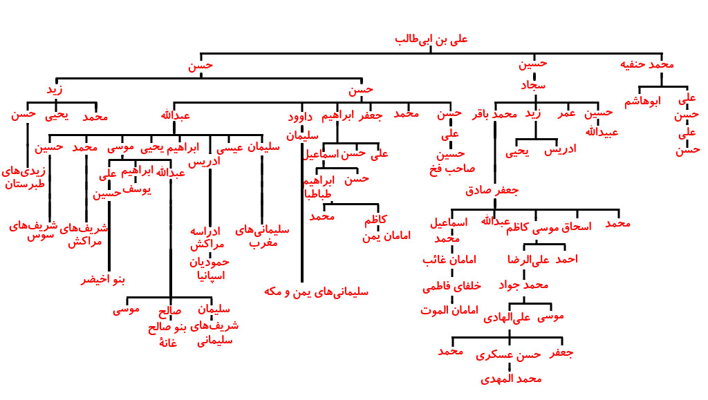 شجره‌نامه علی‌بن ابیطالب برگرفته از دانشنامه اسلام